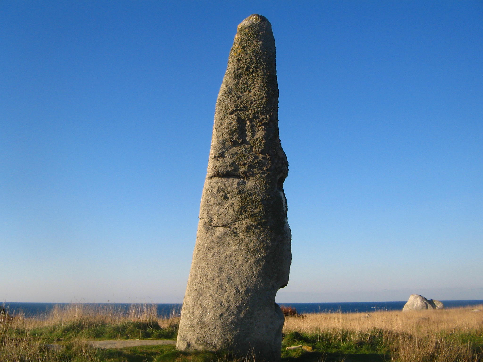 Menhirs de Cam Louis de la commune de Plouescat, datant de l'âge de bronze (oeuvre mégalithes).